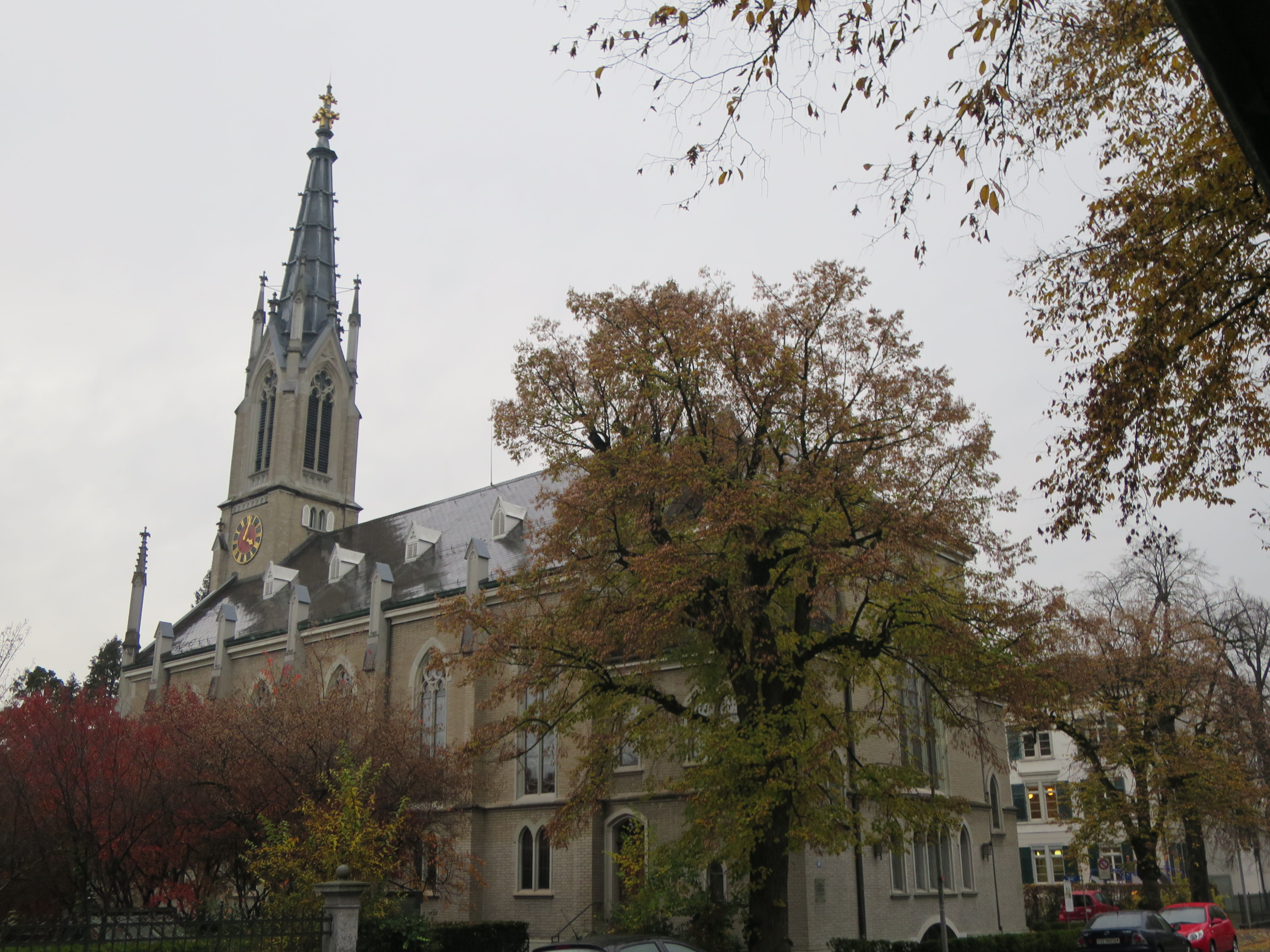 Ref. Kirche Unterstrass - Aussenansicht von Nordosten